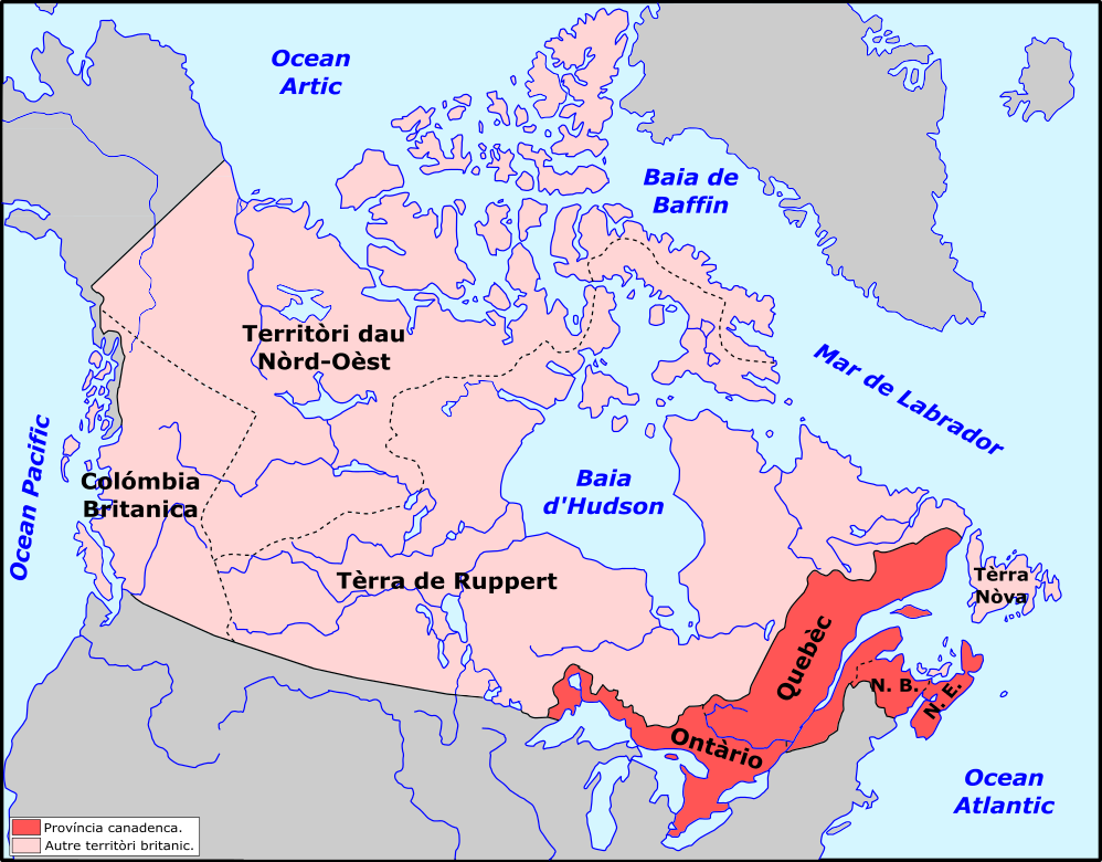 Territòri canadenc en 1867.